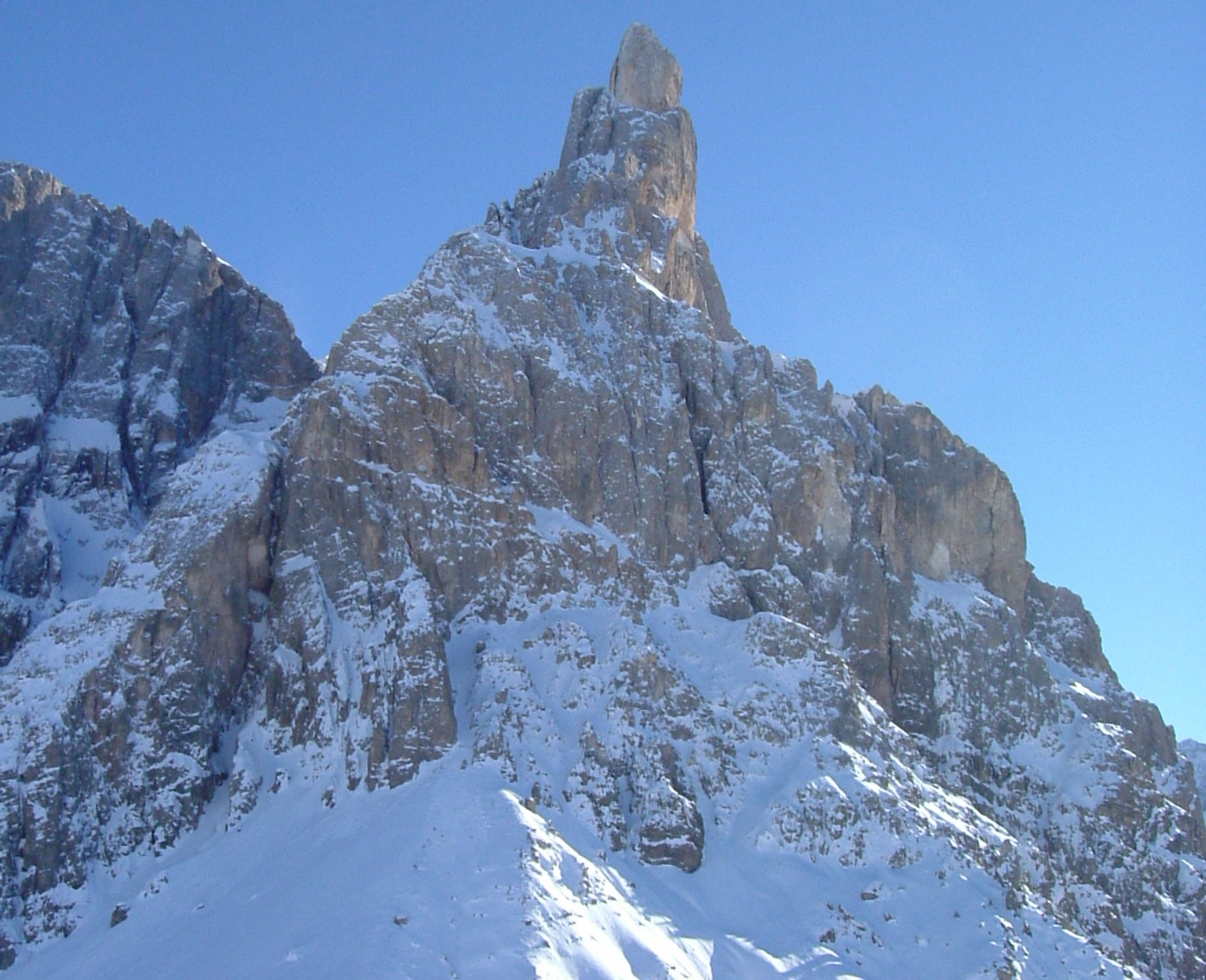 Cimon della Pala